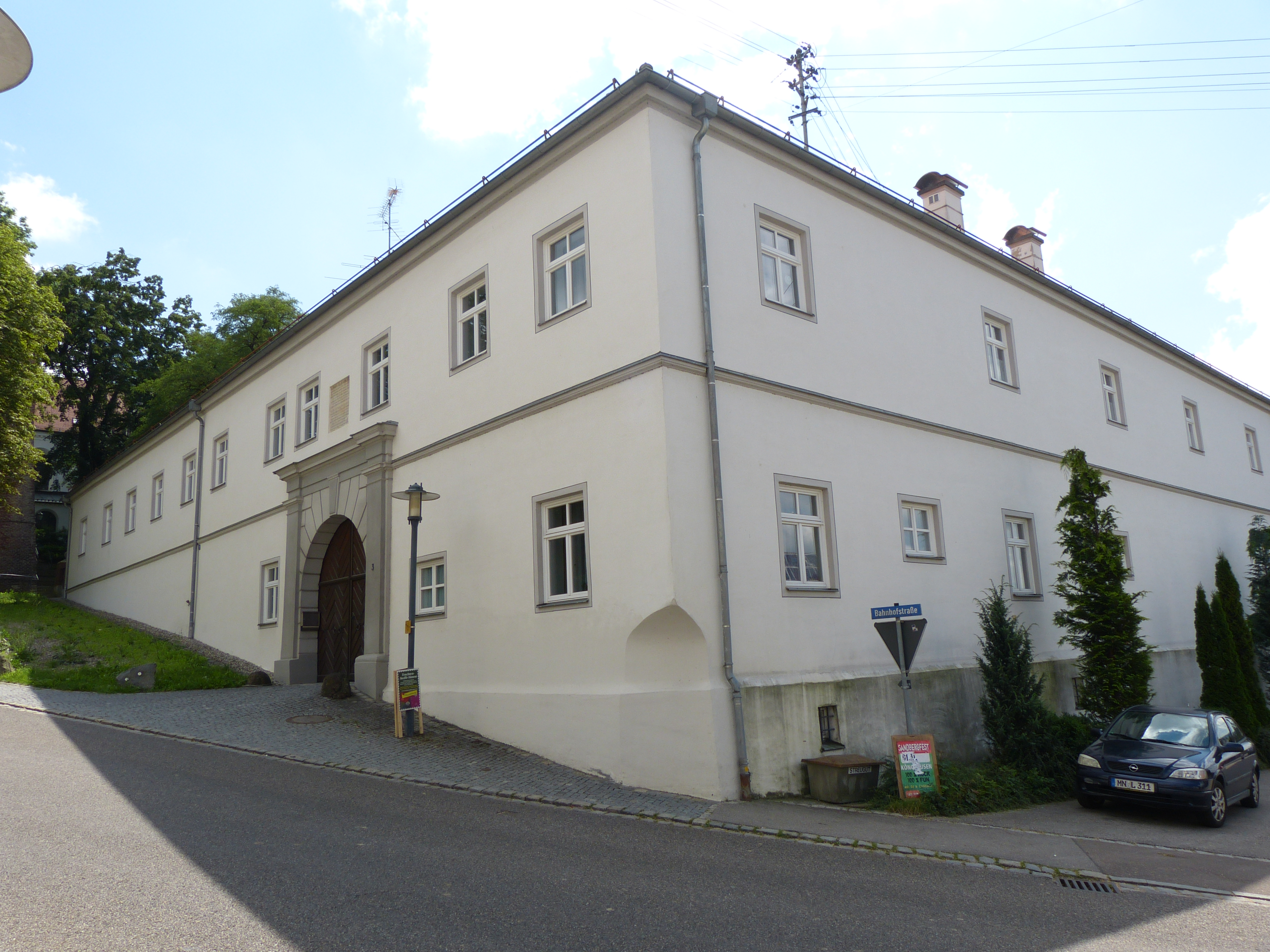 Ehemaliges Dominikanerkloster, Kirchheim in Schwaben, Landkreis Unterallgäu, Bayern